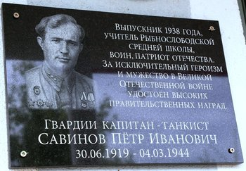 Мемориальная доска Савинова П.И